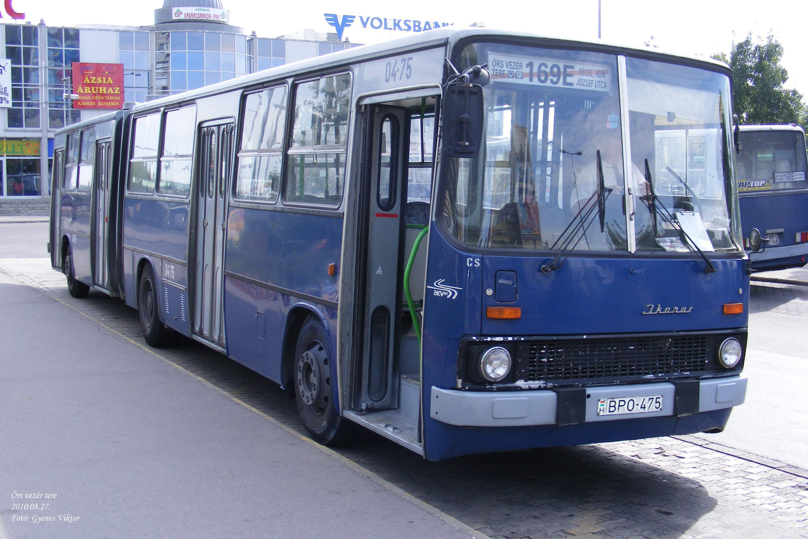 169E jelzésű Ikarus 280-as busz az Örs vezér terén